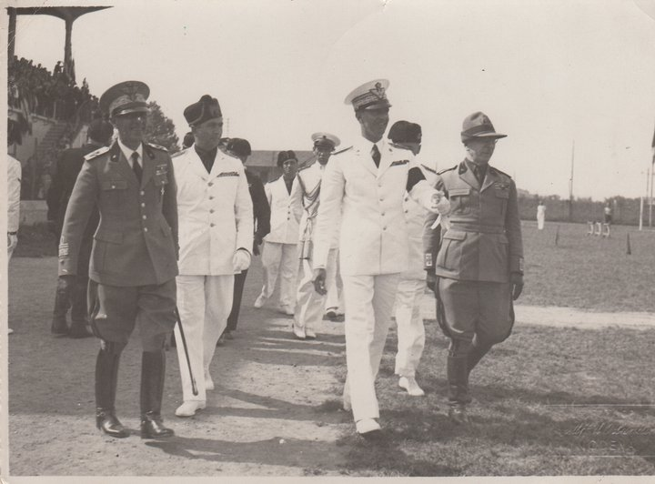 Principe Umberto II di Savoia allo Stadio comunale del Littorio (Mirandola) - 01